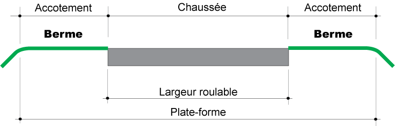 Terminologie routière – Berme